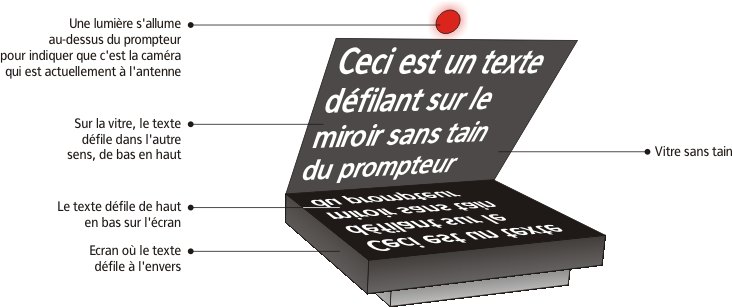 Schéma de fonctionnement d'un prompteur en 2D.